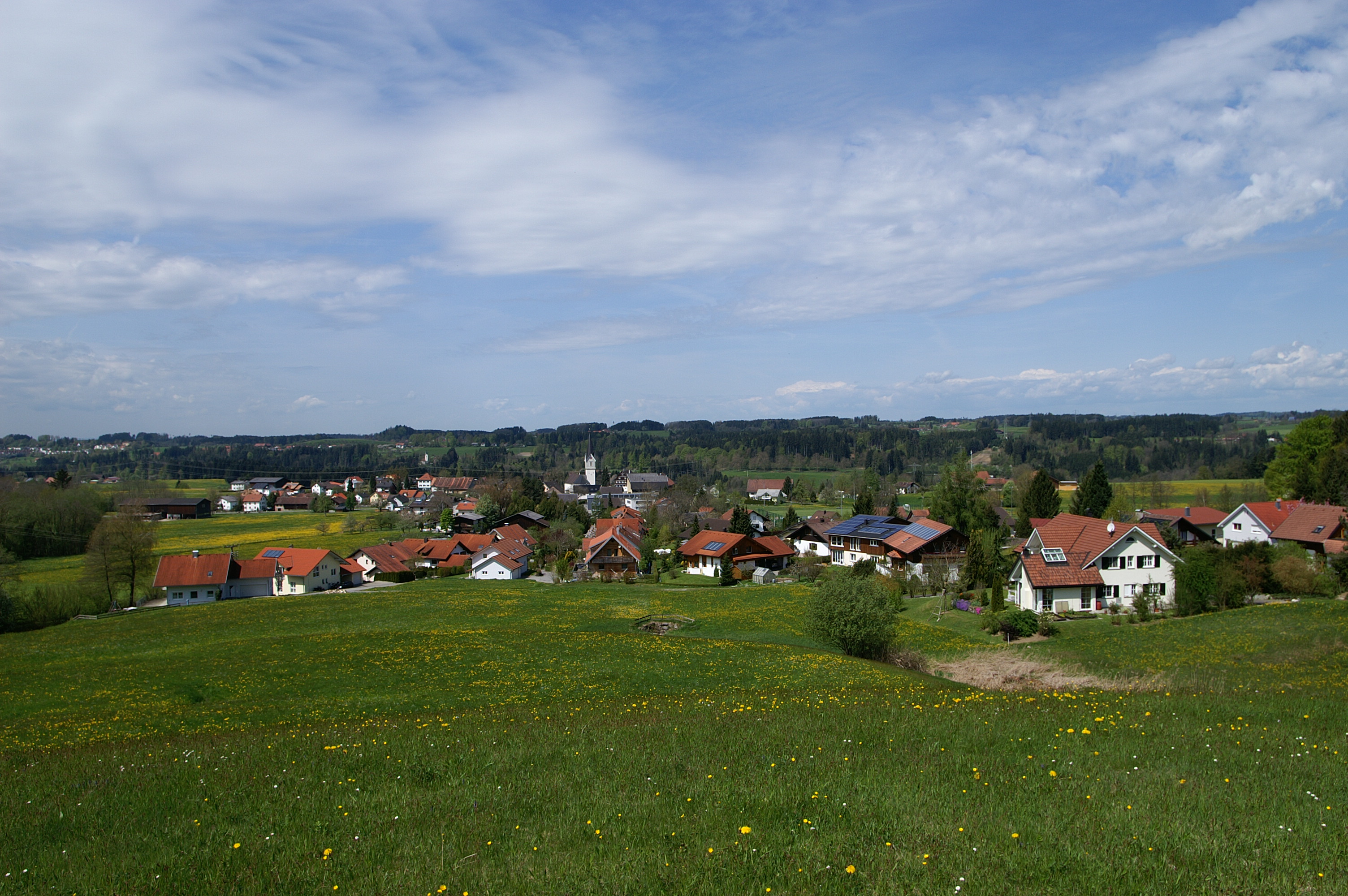 Blick auf Hohenweiler in (Vorarlberg).